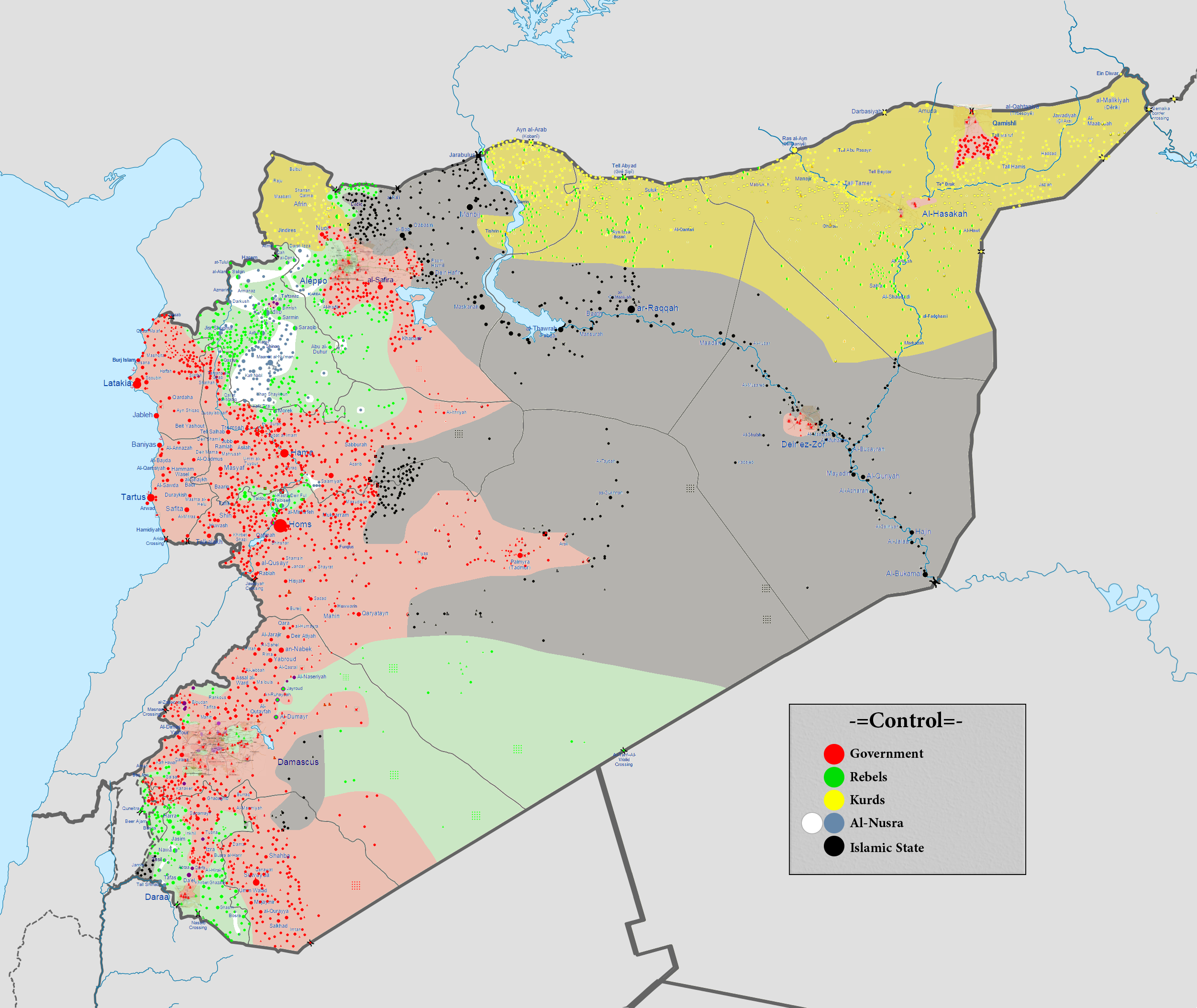 Guerre civile syrienne au 1er mai 2016